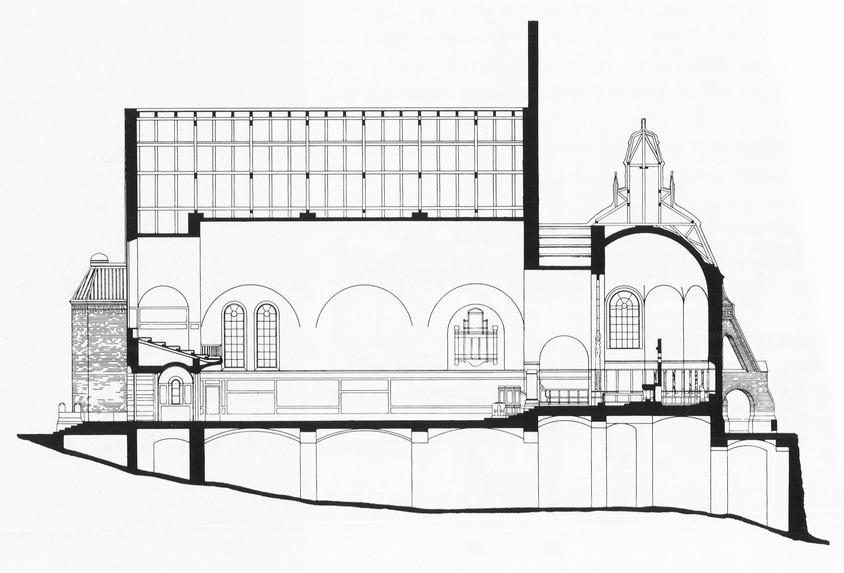 Uppenbarelsekyrkan i Saltsjöbaden, Bobergs sektionsritning.